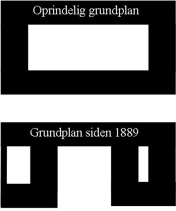 Grundplaner over Ålholm (den ældst kendte og efter den seneste større ombygning i1889) Ground plan of Ålholm (1500 and 1889)